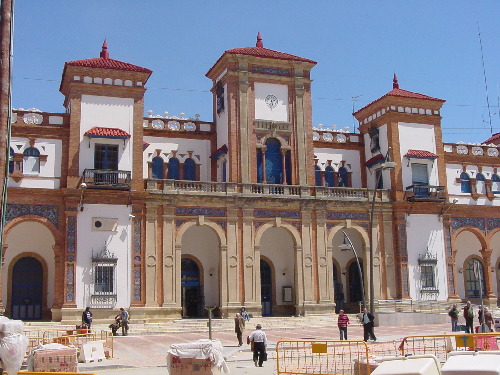 Estación monumental de Jerez de la Frontera, Provincia de Cádiz, España.